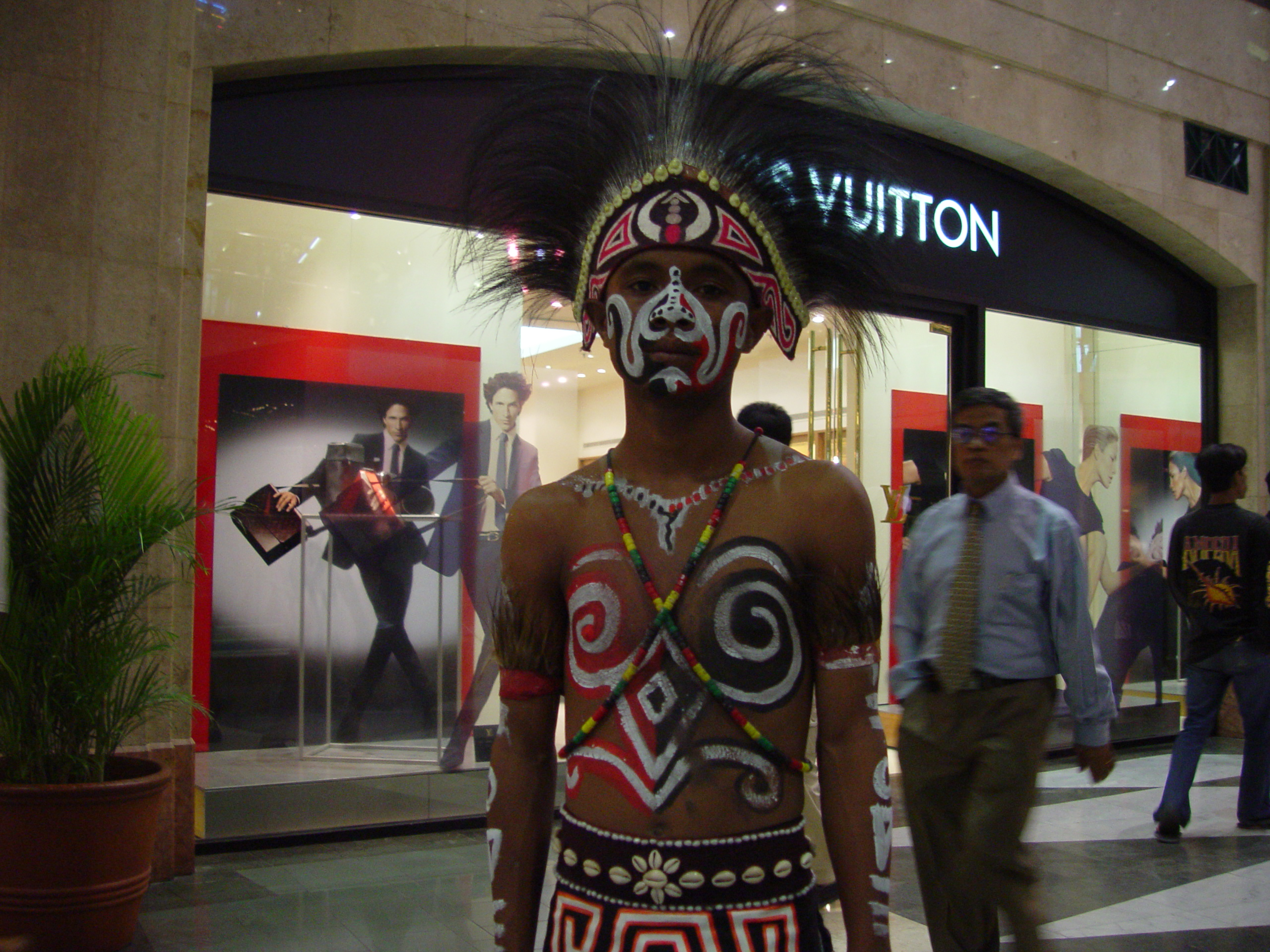 Mall cultural in Jakarta, Indonesia.